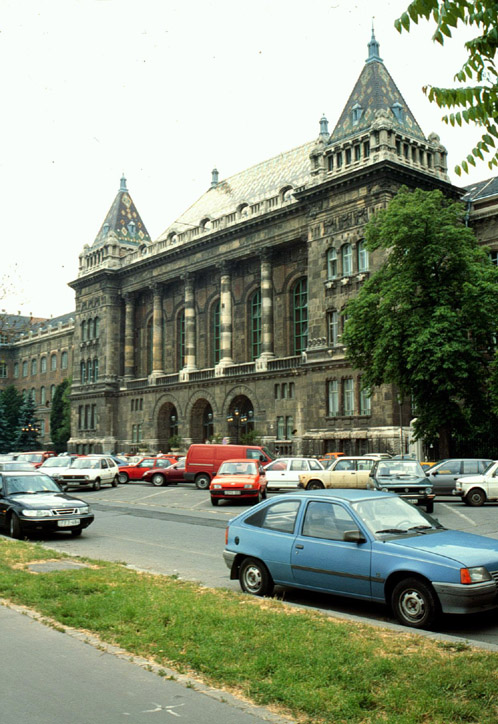 BME K épület, főbejárat